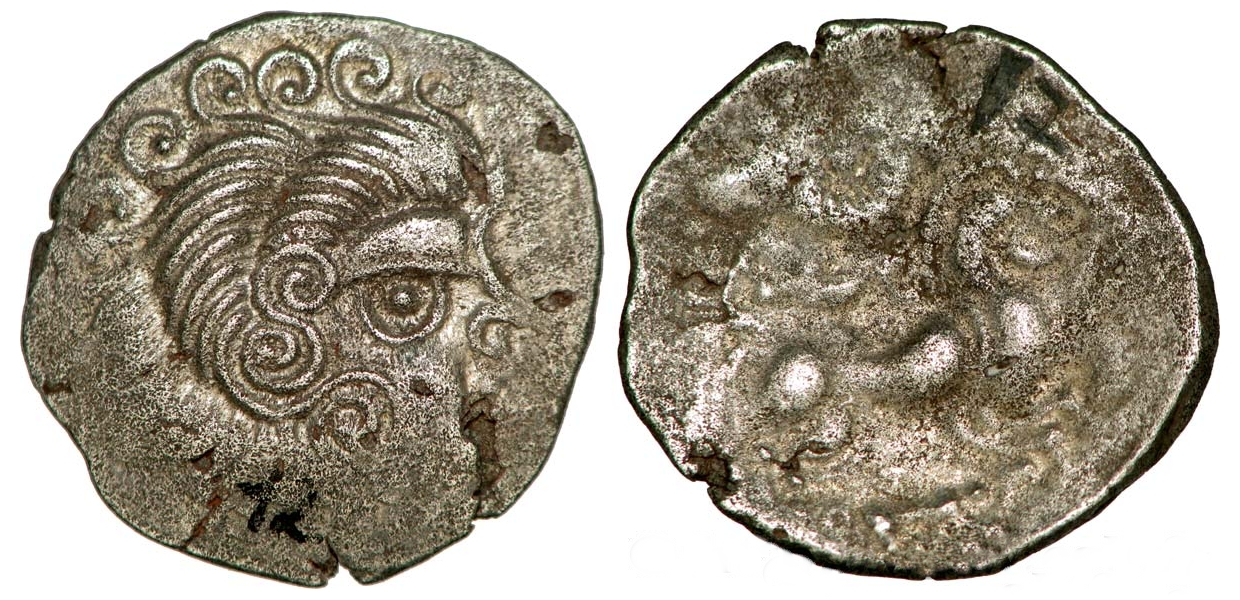 Statère d'argent des Coriosolites, trouvaille de Trébry (Côtrs-d'Armor). Écrit à l'encre 12 numéro de référence dans l'ensemble des 1742 statères du trésor.